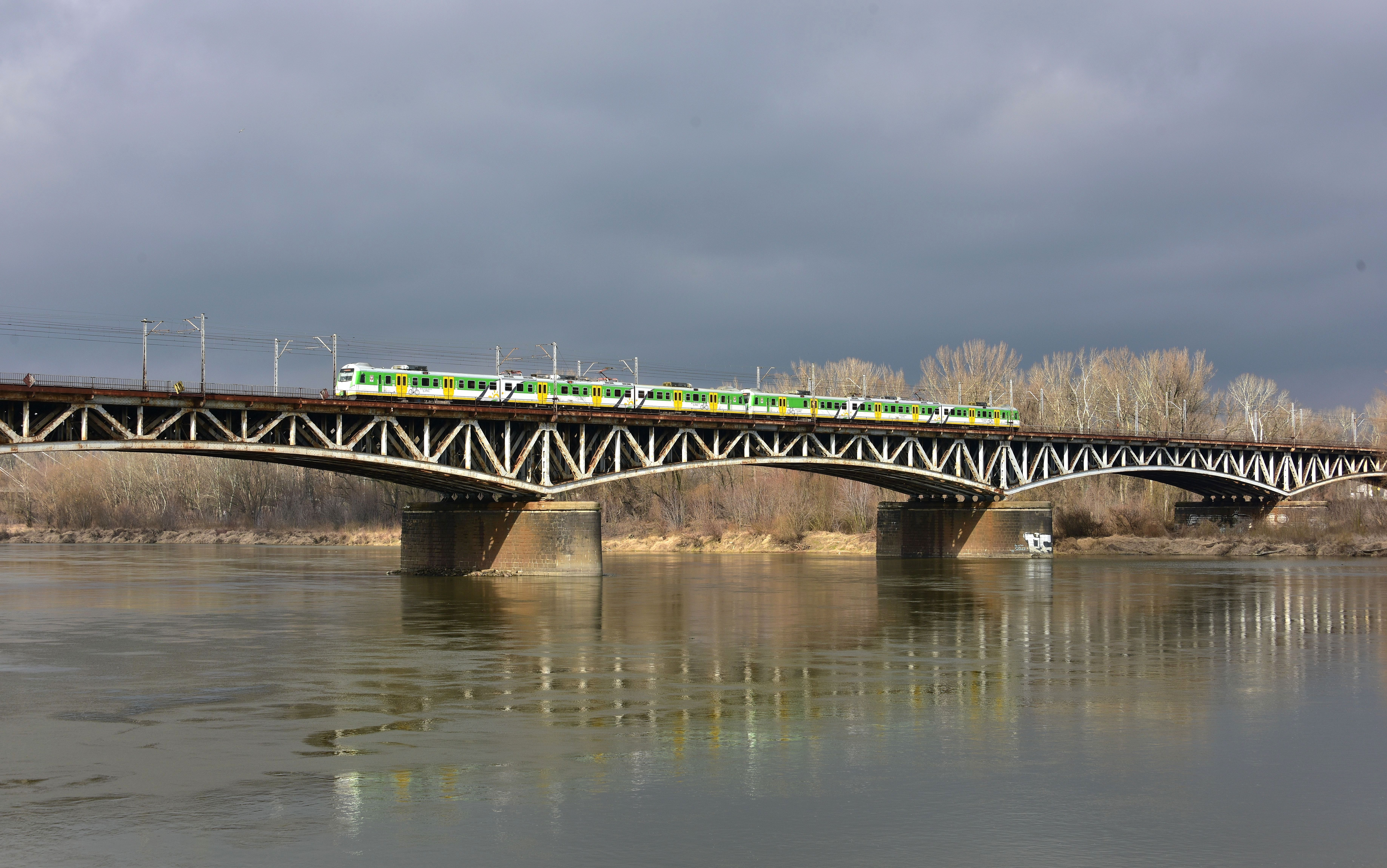 Most średnicowy w Warszawie